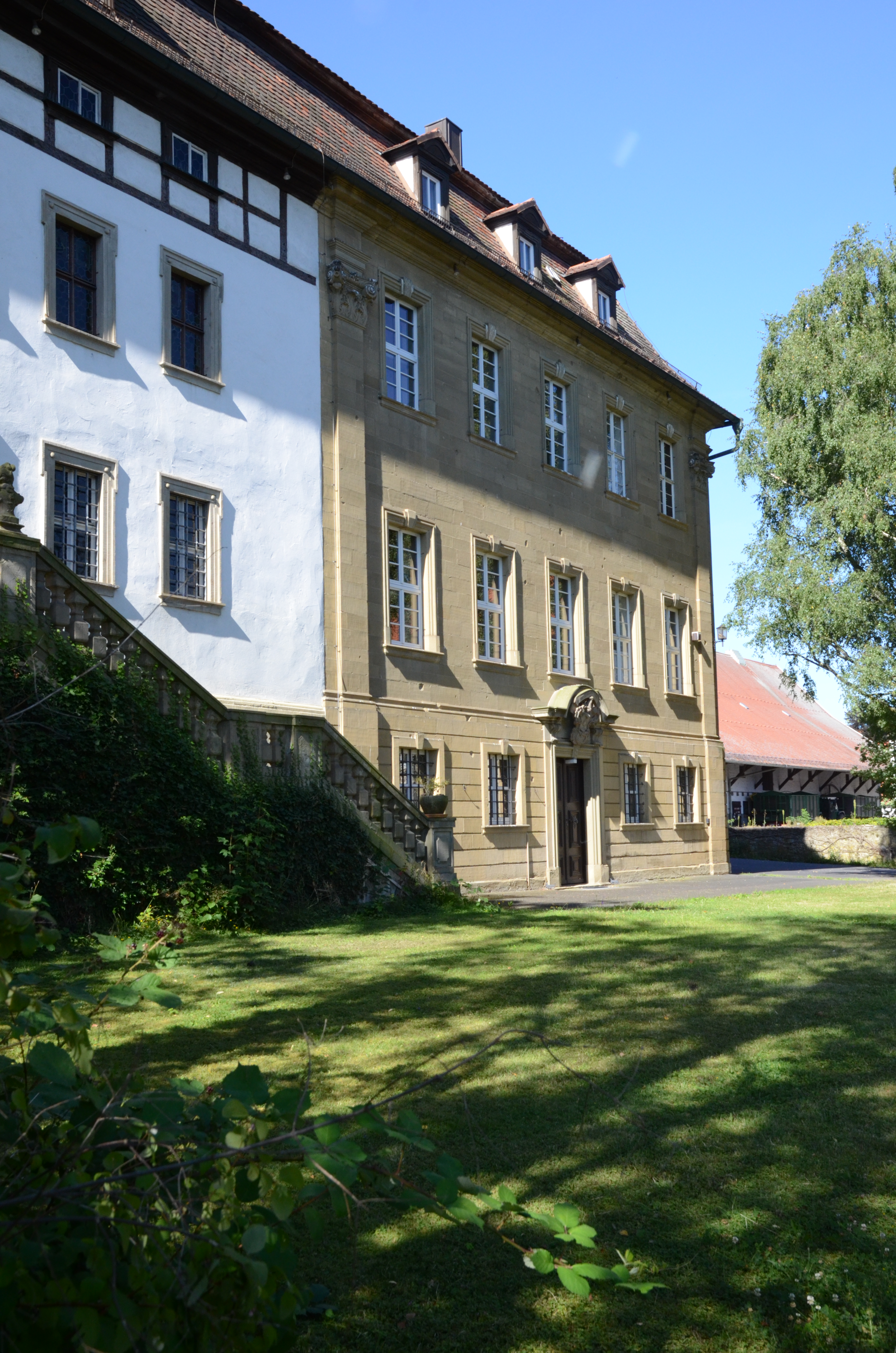 Schloss im Euerbacher Gemeindeteil Obbach